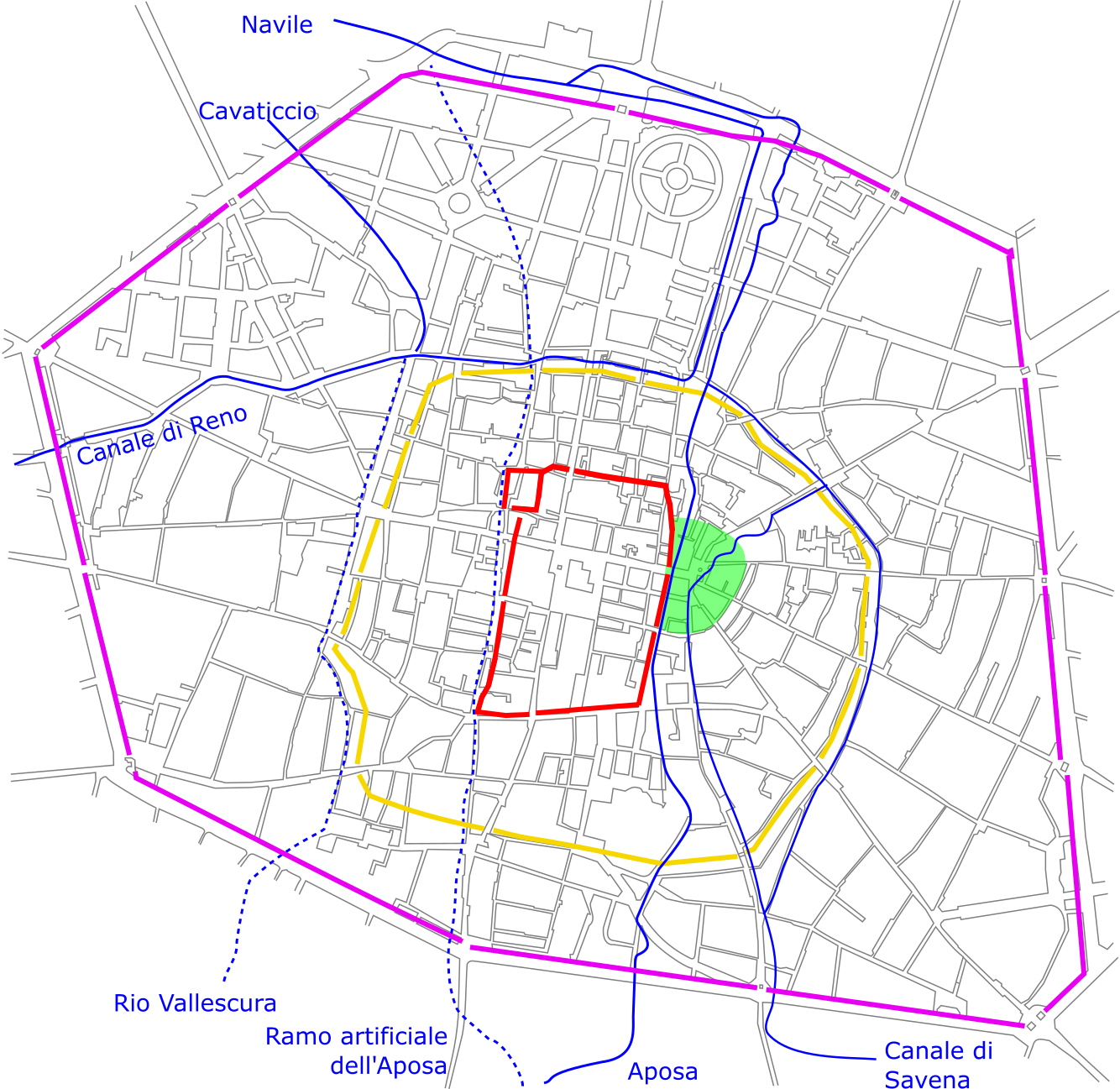 Le cinte murarie e i canali di Bologna. In rosso la cinta di selenite (tracciato ipotetico) In verde l'addizione longobarda In giallo la "cerchia dei mille" In rosa la "circla"